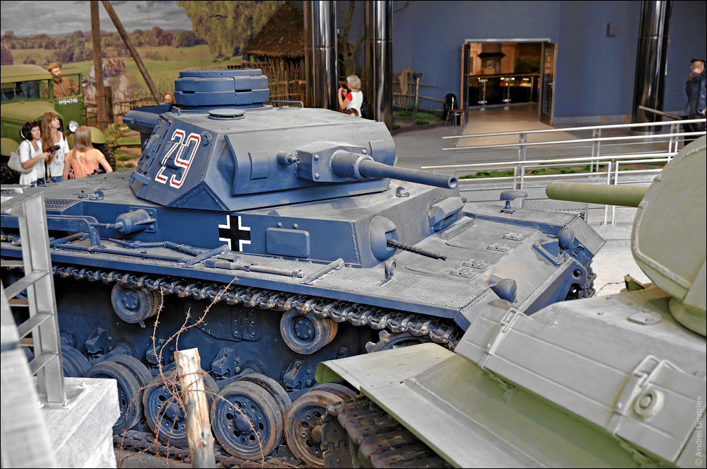 Экпазіцыя музея ВАв